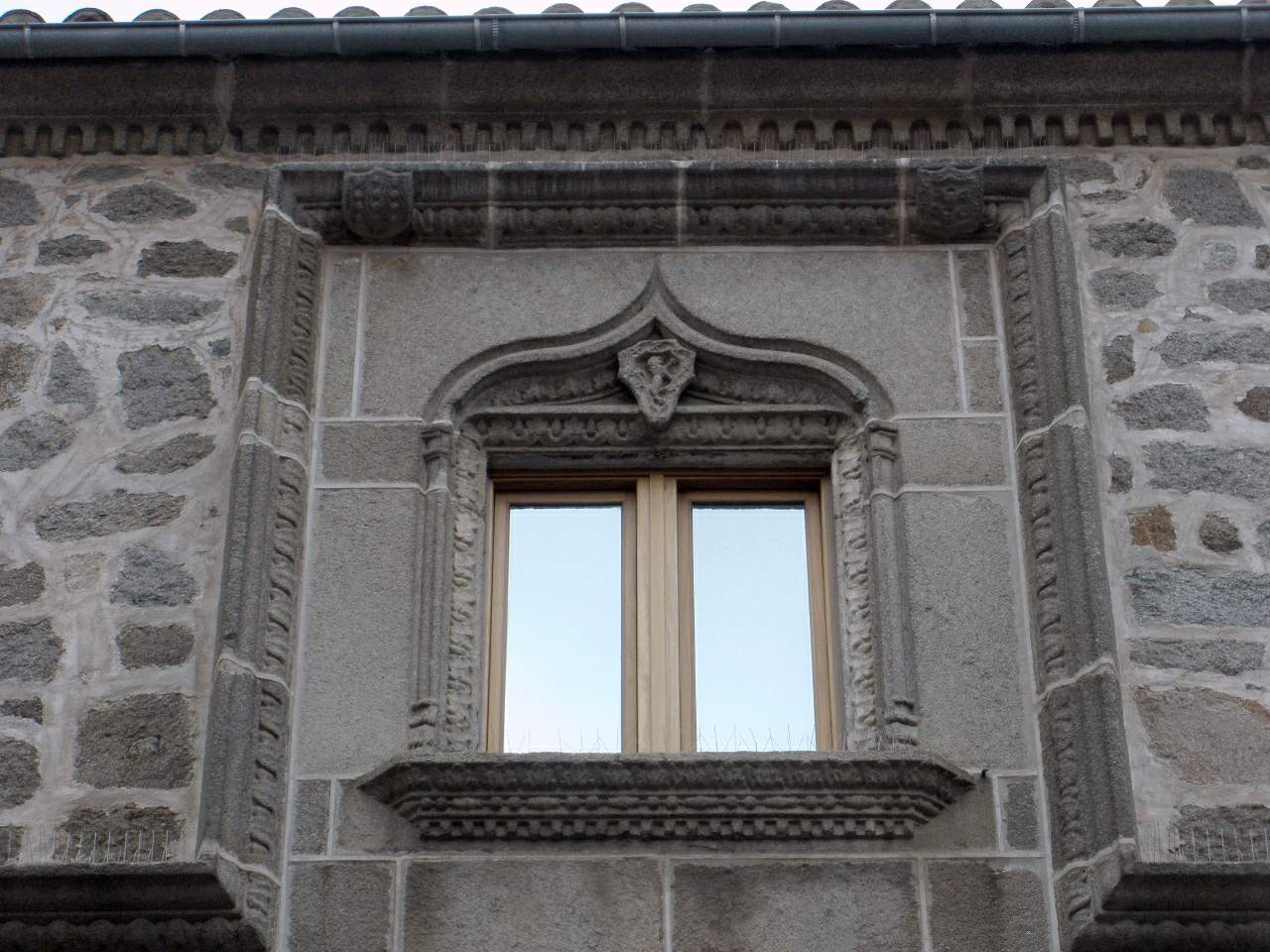 Avila - Palacio de los Cerralbo y Almarza-Convento de las Religiosas Siervas de Maria